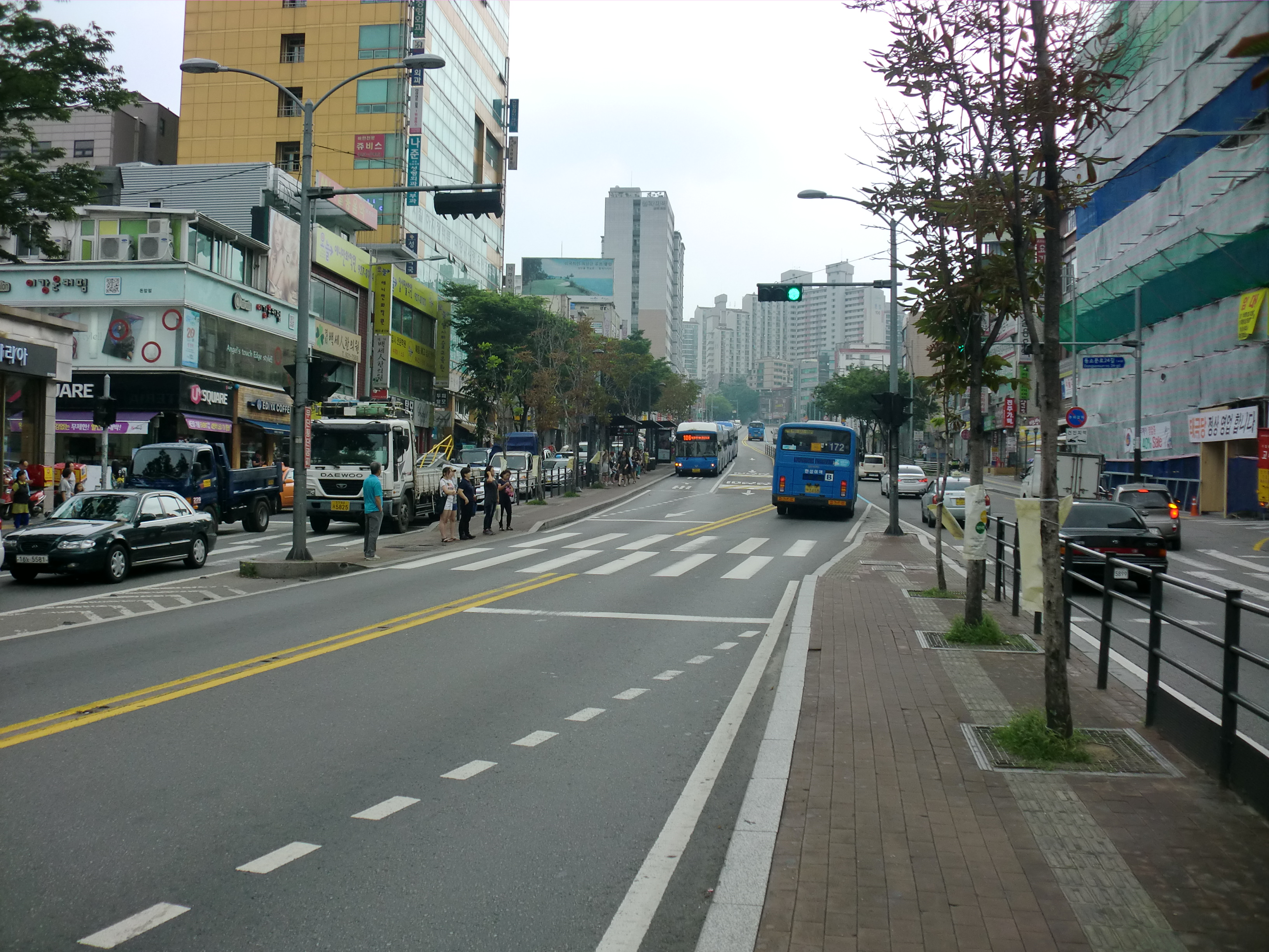 서울특별시 종로구 창경궁로에 있는 중앙버스전용차선